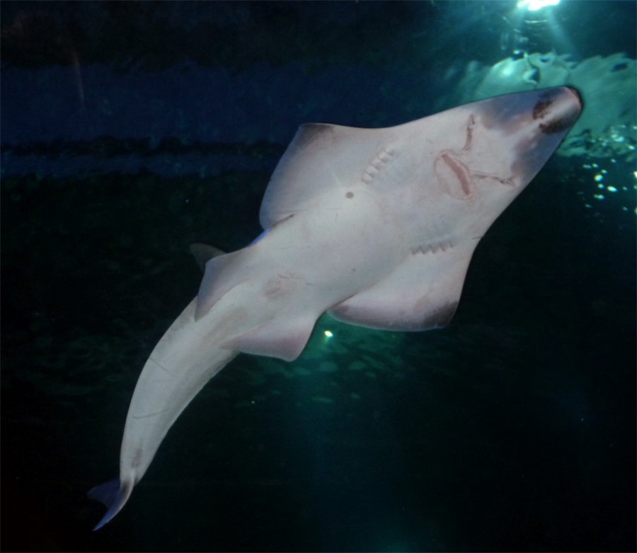 Rhynchobatus djiddensis ventral view